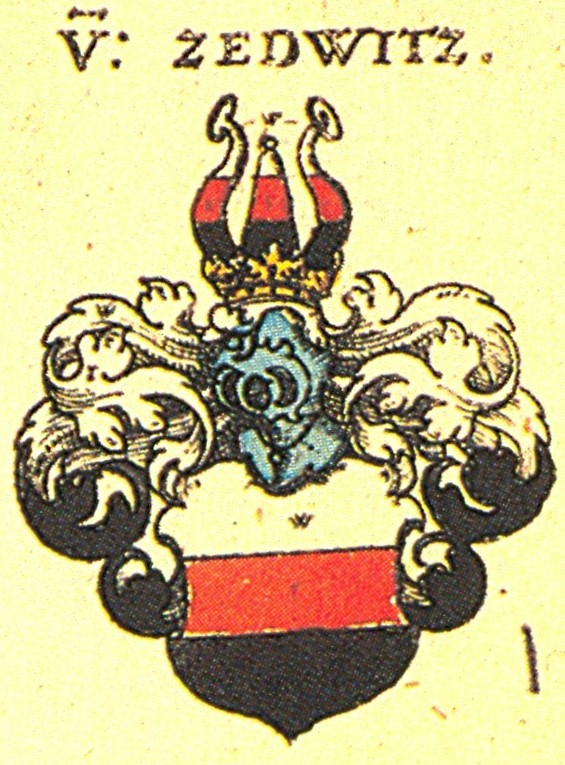 Ritterschaft und Adel in Franken Wappen der fränkischen und böhmischen Adelsgefamilie Zedtwitz